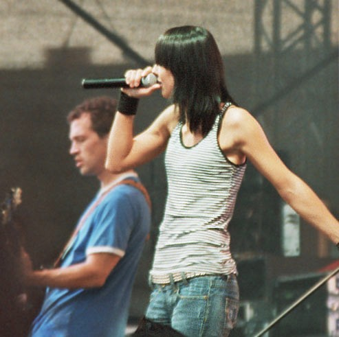 Die österreichische Sängerin Christina Stürmer (Konzert zur U-Bahn-Eröffnung, Station Kagraner Platz) / Austrian singer Christina Stürmer